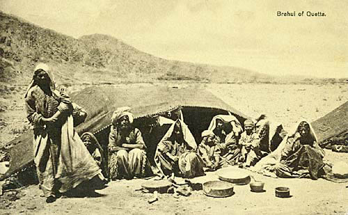 ഉറവിടം